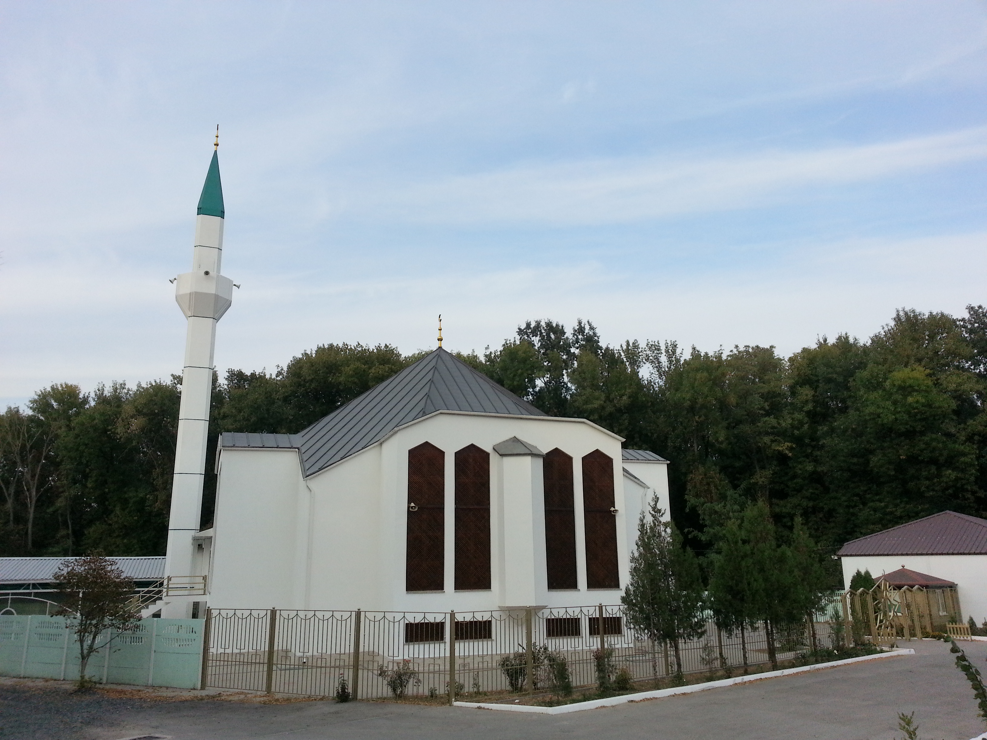 Mosque in the city of Rostov-on-Don, Russia, st. Furmanovsky 131 Мечеть города Ростова-на-Дону, Россия, ул. Фурмановская 131